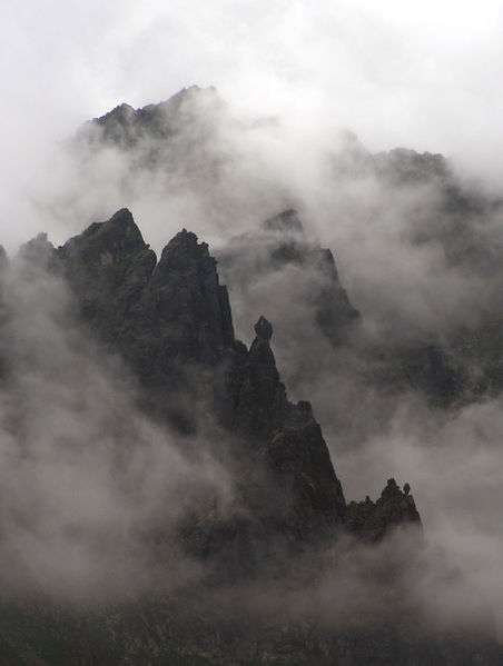 Wierzchołki Żabiego Mnicha i Żabia Lalka doskonale widoczne dzięki chmurom wyodrębniającym je ze skalistego tła ściany Żabiego Szczytu Wyżniego.